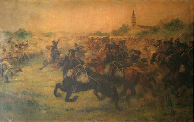 Combate de San Lorenzo